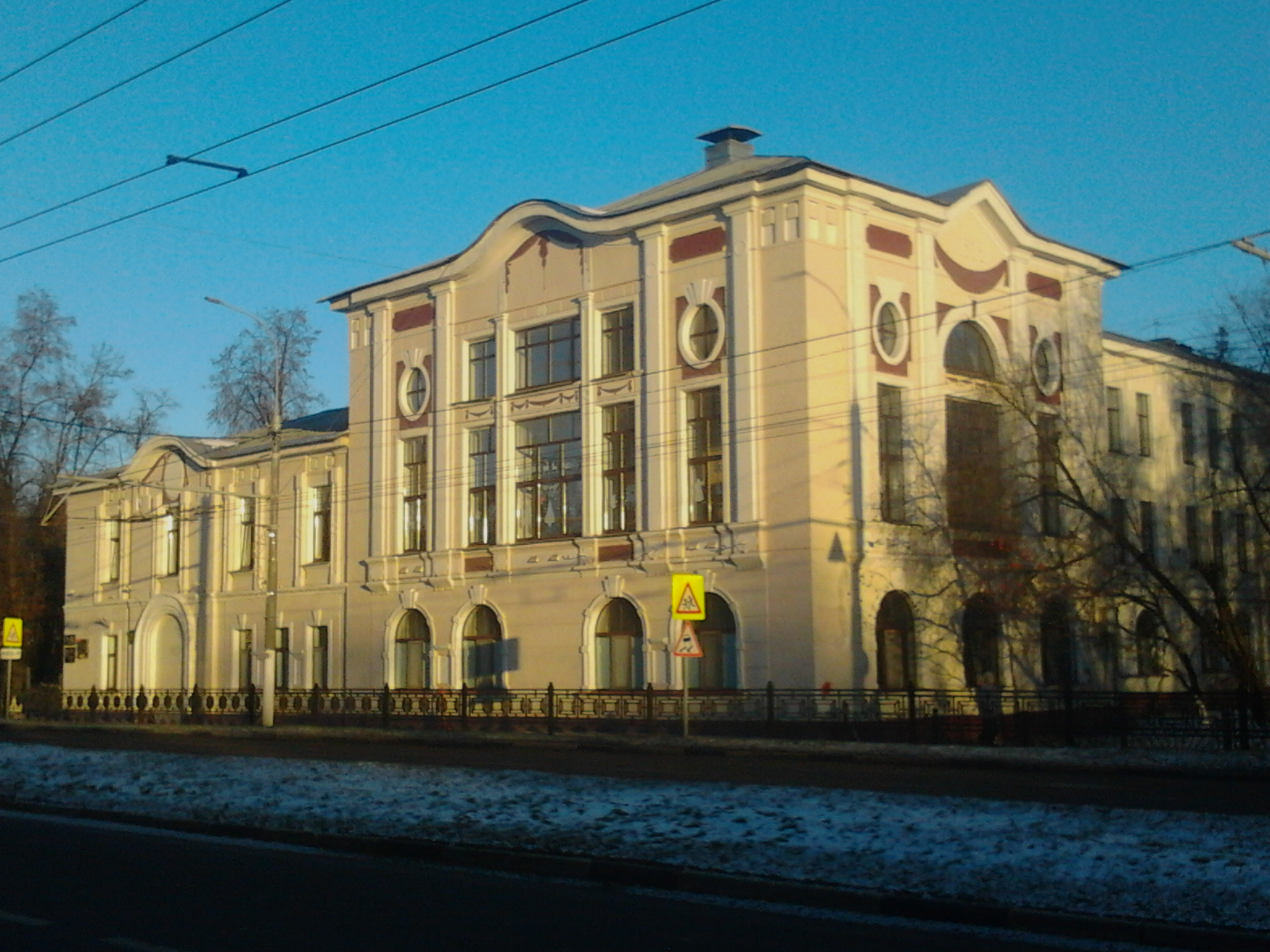 Памятник архитектуры. 1912 г. Памятник градостроительства и архитектуры местного (городского) значения. Ныне - Лицей № 1